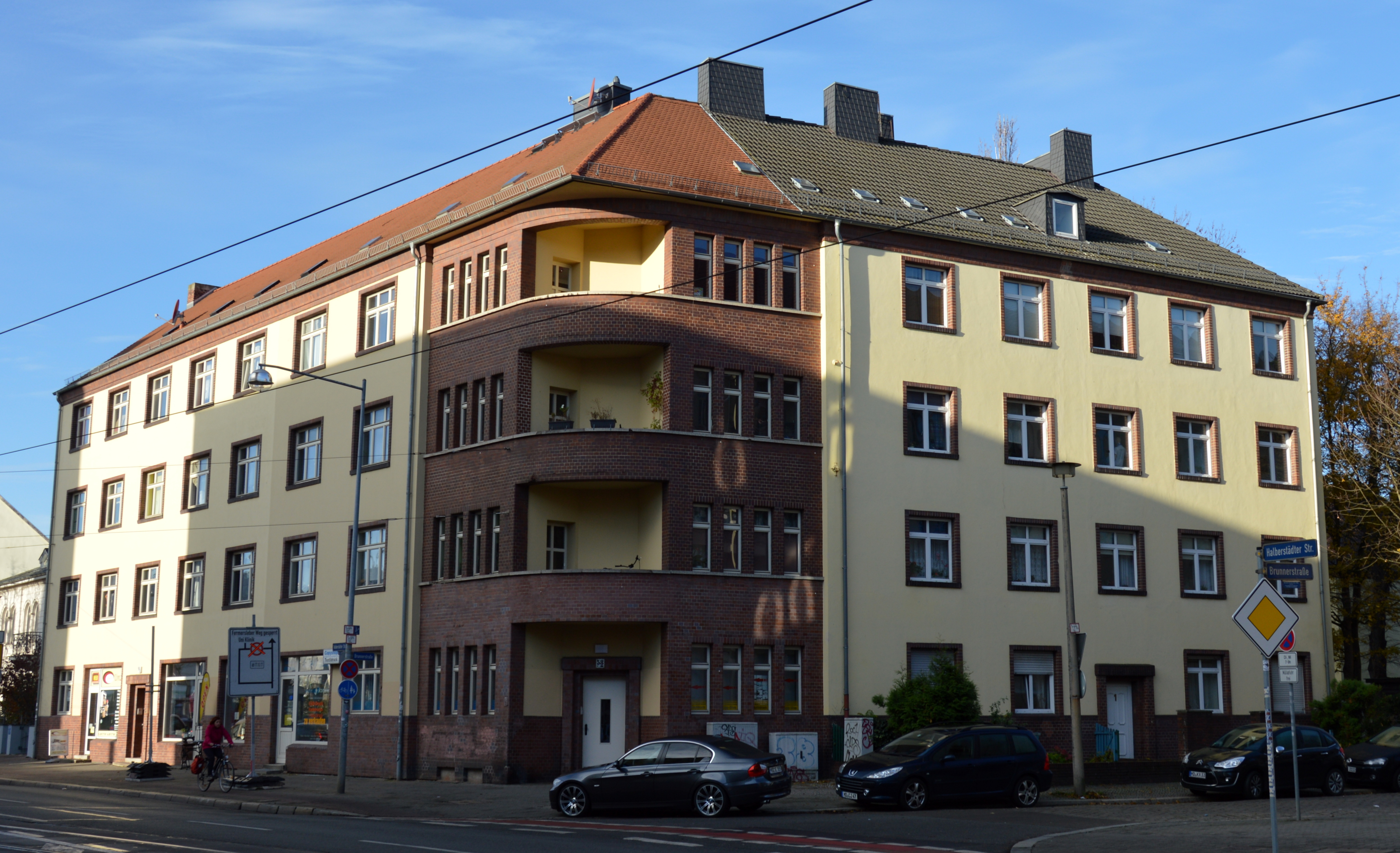 Brunnerstraße 1